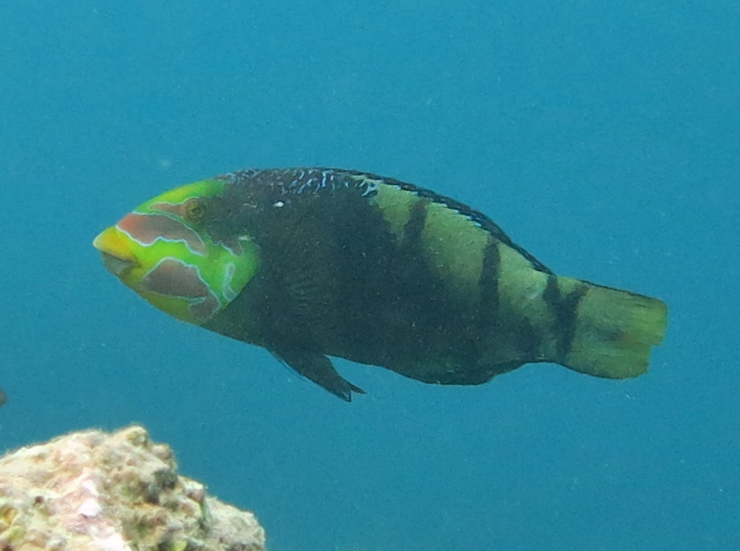 Un tamarin à bandes noires (Hemigymnus fasciatus) aux Maldives (Thiladhoo, atoll de Baa).